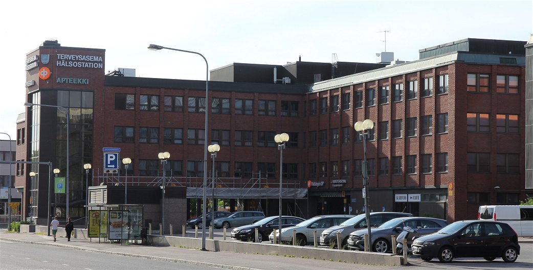 Tikkurilan terveysasema Vantaan Tikkurilassa.